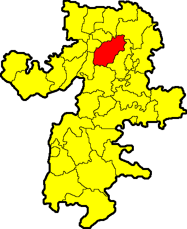 Аргаяшский район на карте Челябинской области